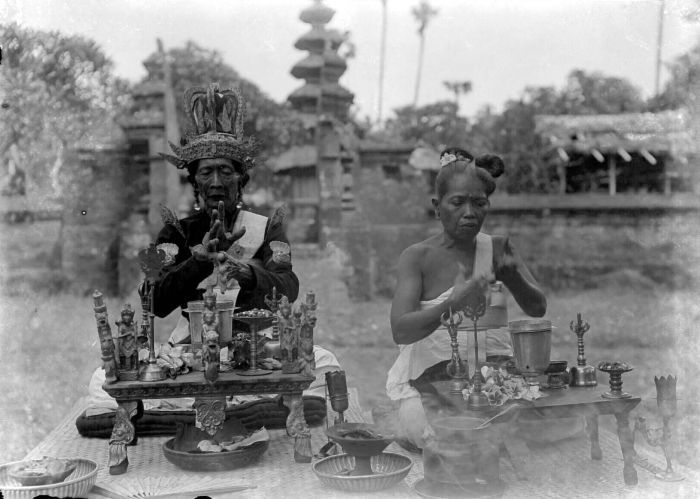 Negatief. Pedanda-Buddha en Pedanda-Istri in functie, Bali.